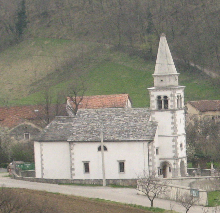 Vas Lozice avtor